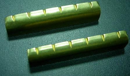 吉他上弦枕